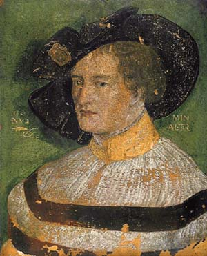 Self-portrait Niklaus Manuel Deutsch